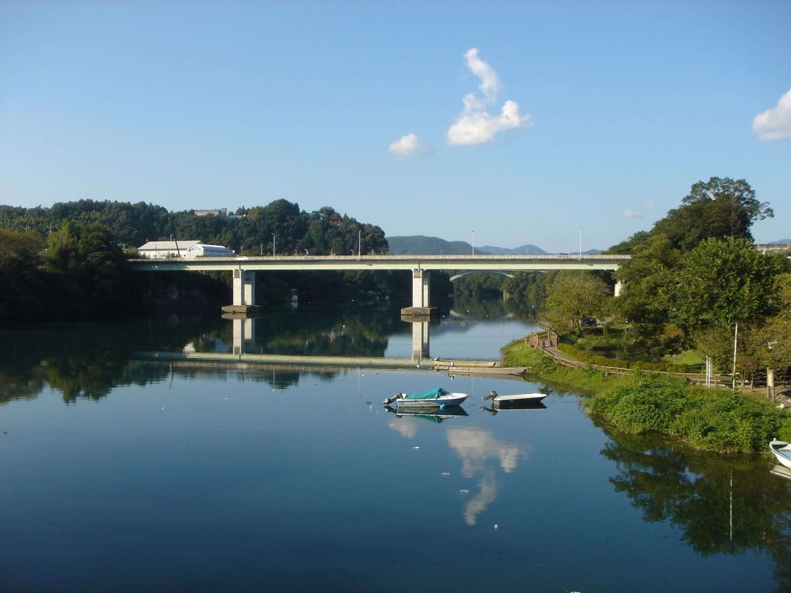 飛騨川に架かる新青柳橋、下流のかんのん橋より撮影